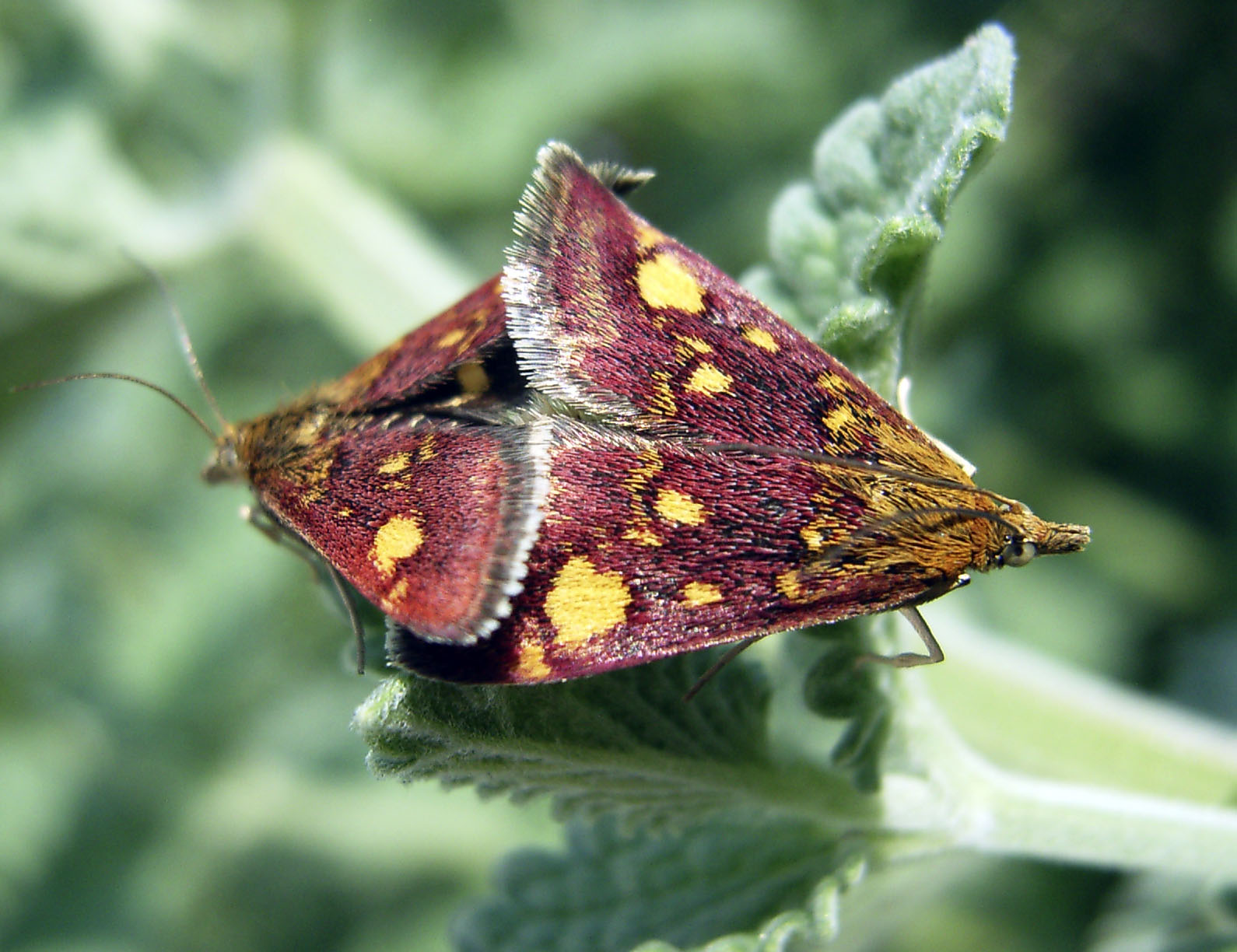 Beschreibung / Description Purpurzünsler (Pyrausta aurata), im Lepiforum bestimmt von Axel Steiner, Fundort: Oldenburg (i. Olbg.) Quelle / Source selbst fotografiert / taken by myself Datum der Aufnahme / Time of creation 28.04.07 Fotograf / Photographer Udo